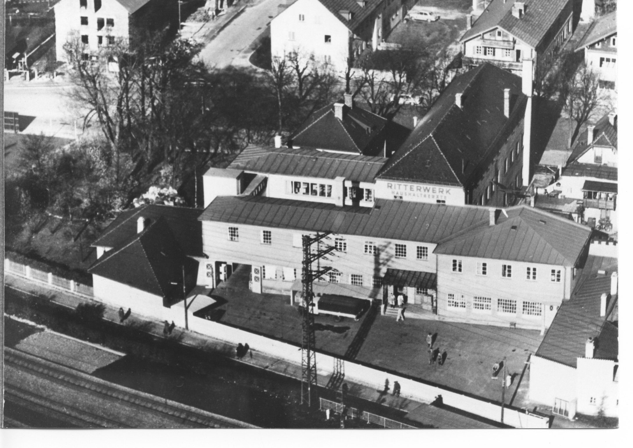 Luftaufnahme ritterwerk Pasing (heutige Pasinger Fabrik)